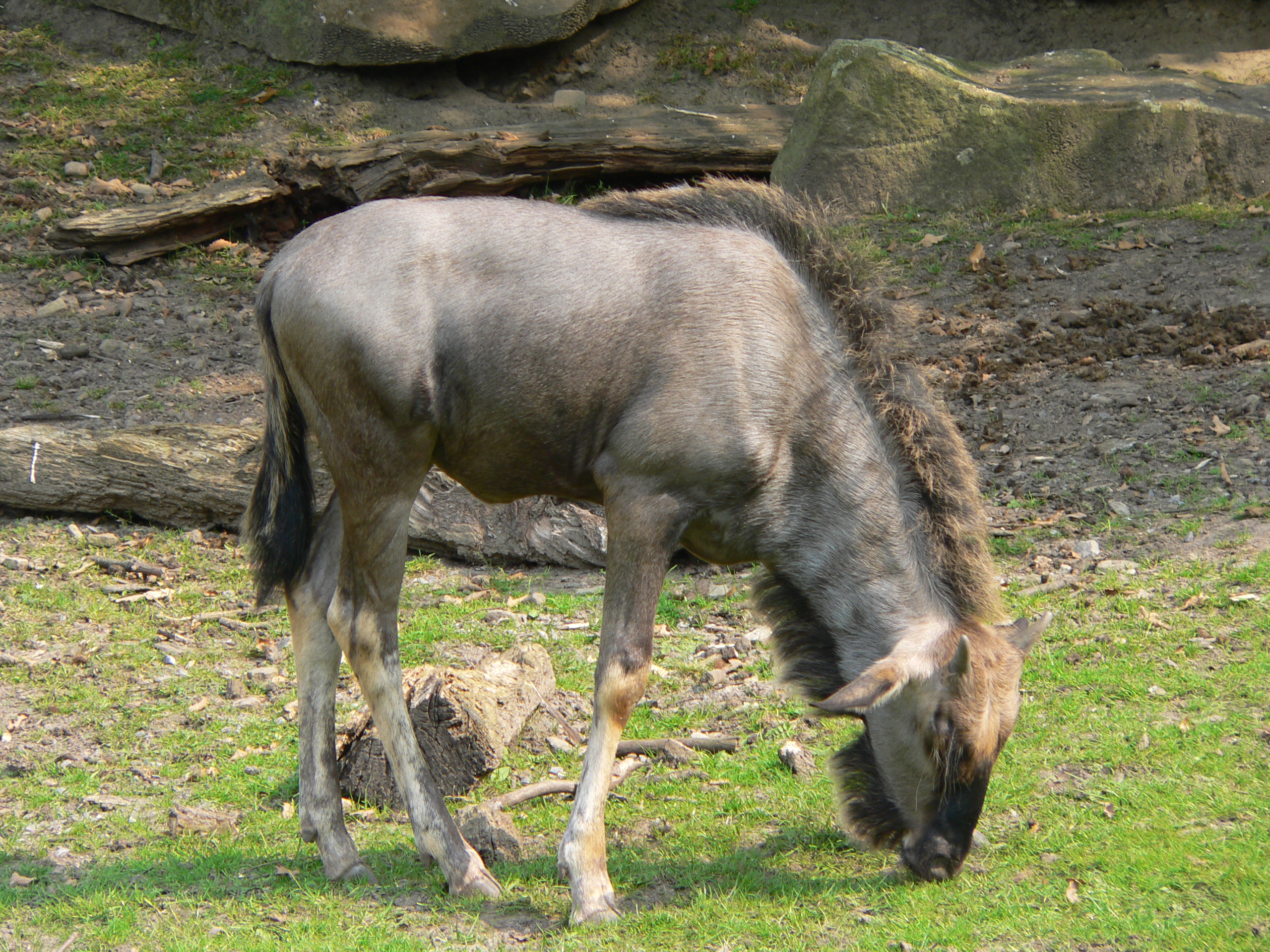 Connochaetus taurinus taurinus